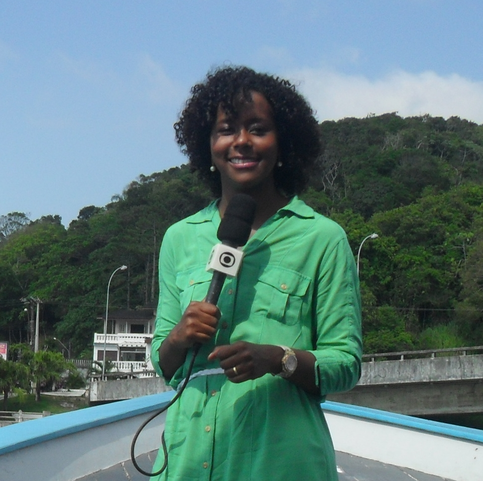 A jornalista brasileira Maria Júlia Coutinho, nesta data, na TV Globo. Observação: Flickr não identifica a jornalista na foto carregada. Para comprovação, vejam-se os seguintes links: #1 e #2